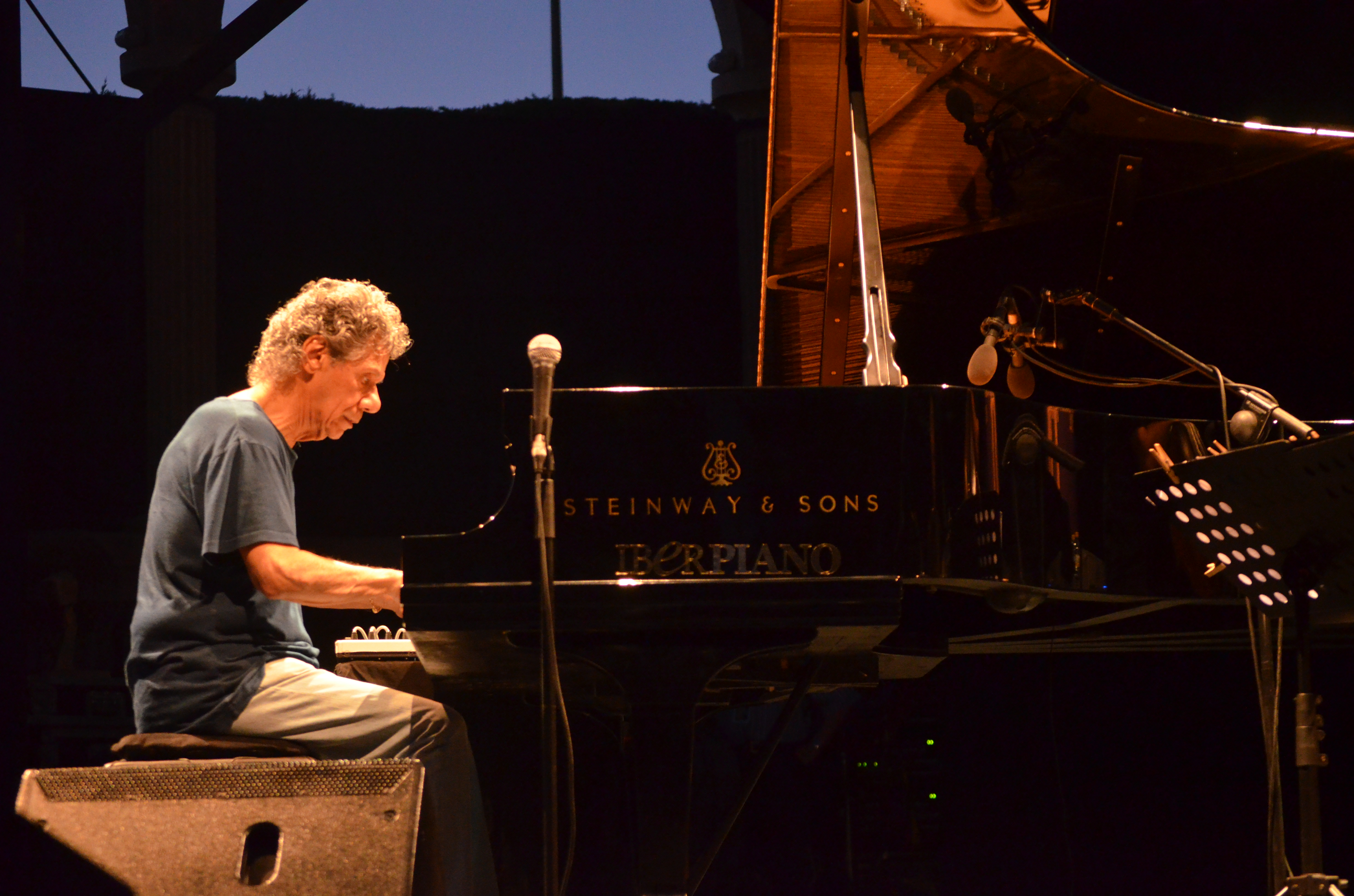 Concierto de "The Chick Corea Akoustic Band": Chick Corea (piano), John Patitucci (bajo) y Dave Weckl (batería). Fesitval Internacional de Jazz de San Javier, 28 de julio de 2018